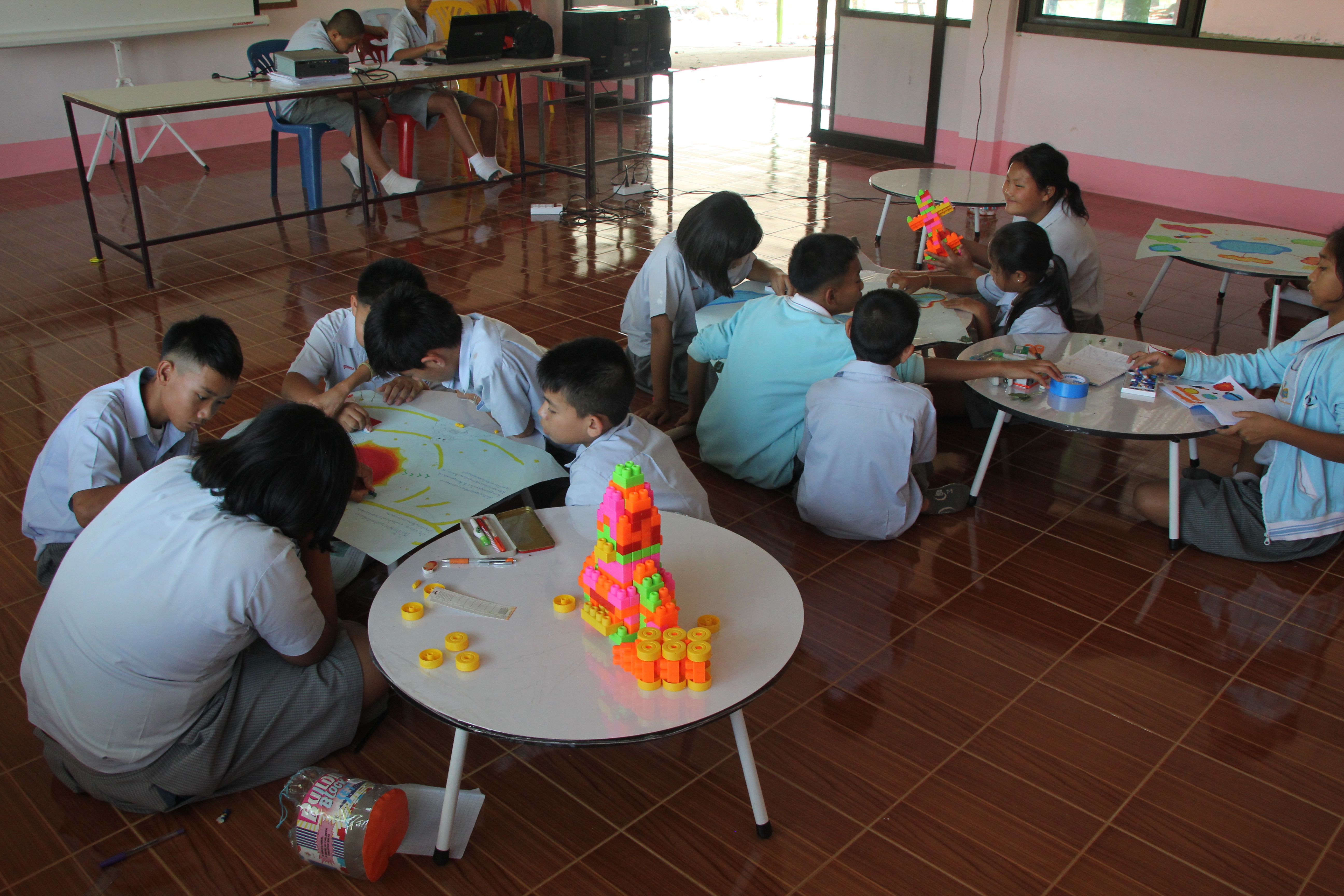 การเรียนรู้แบบบูรณาการโดยโครงงาน